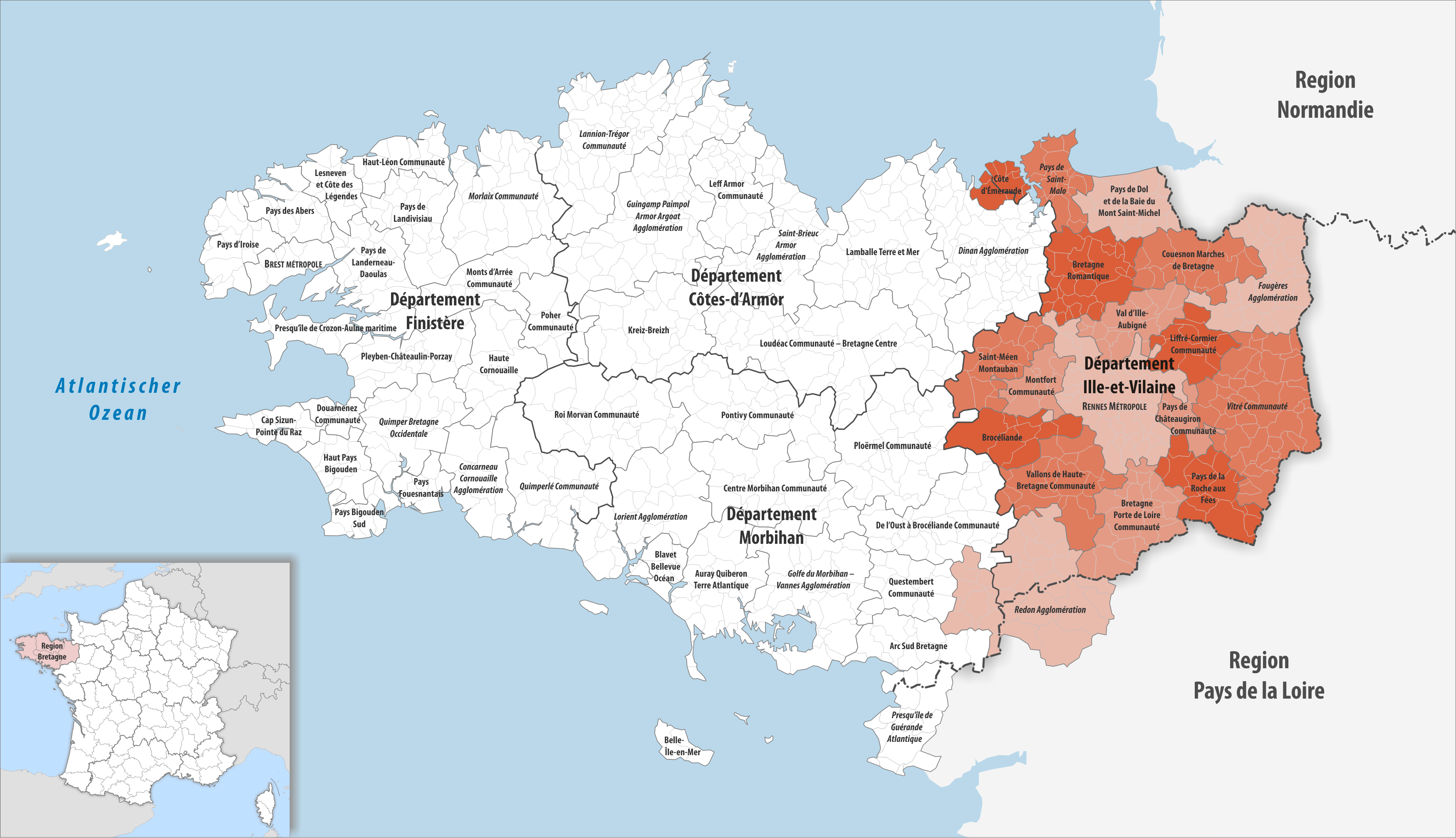 Gemeindeverbände im Département Ille-et-Vilaine